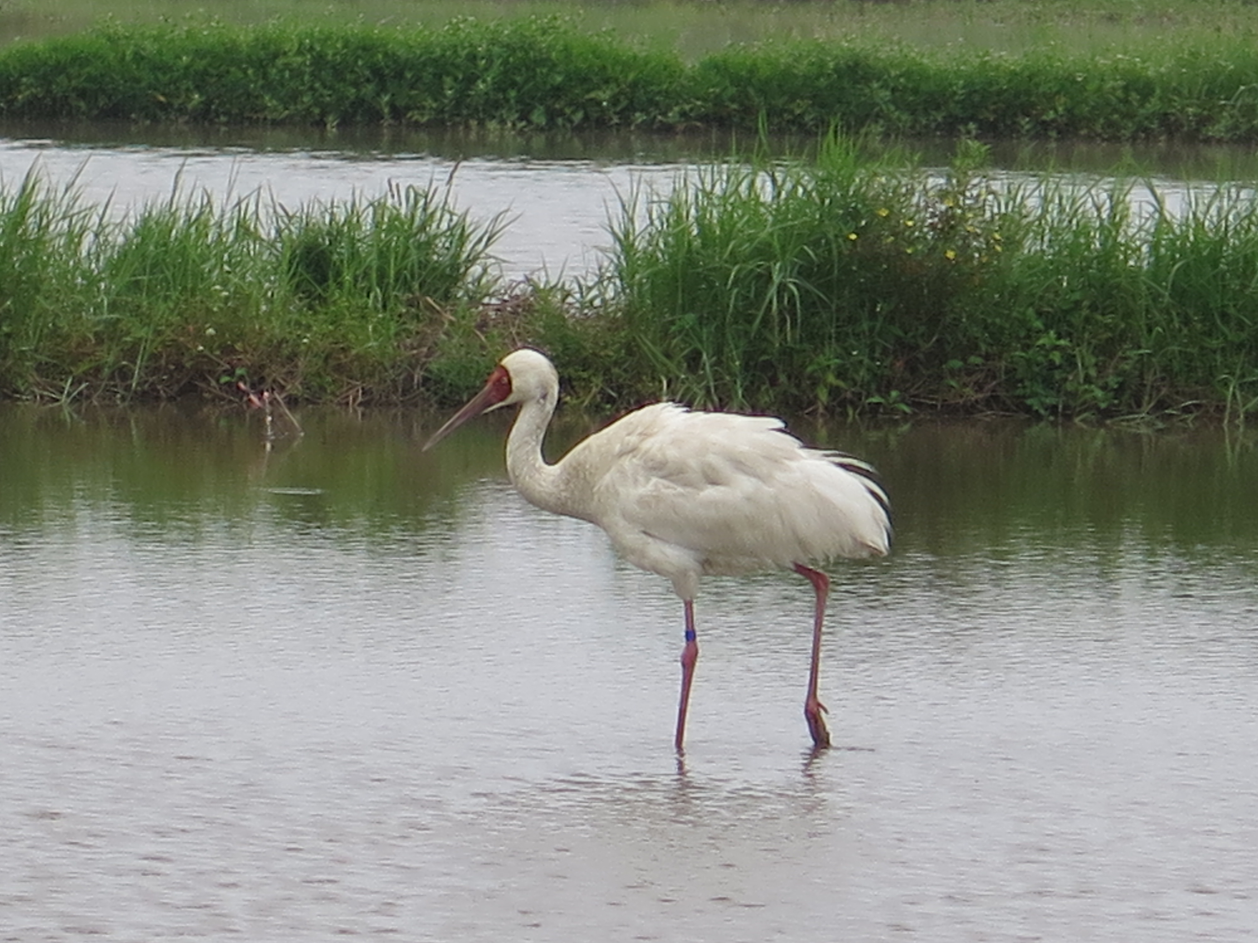 金山小白鶴2016年05月07日拍攝於金山清水路